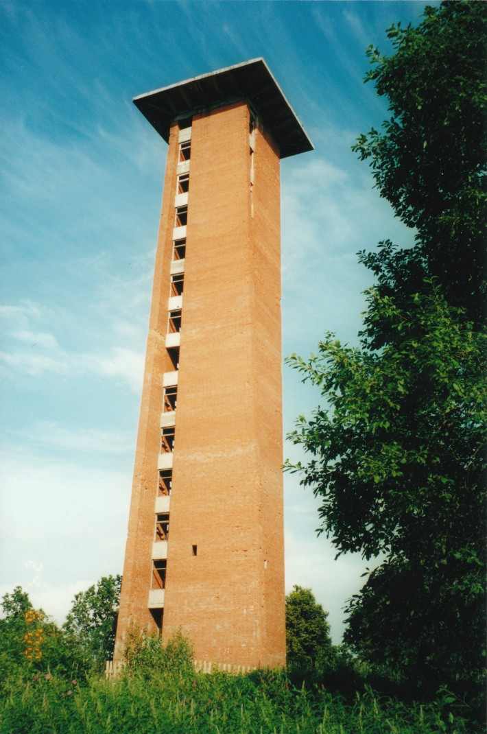 Gaiziņkalns